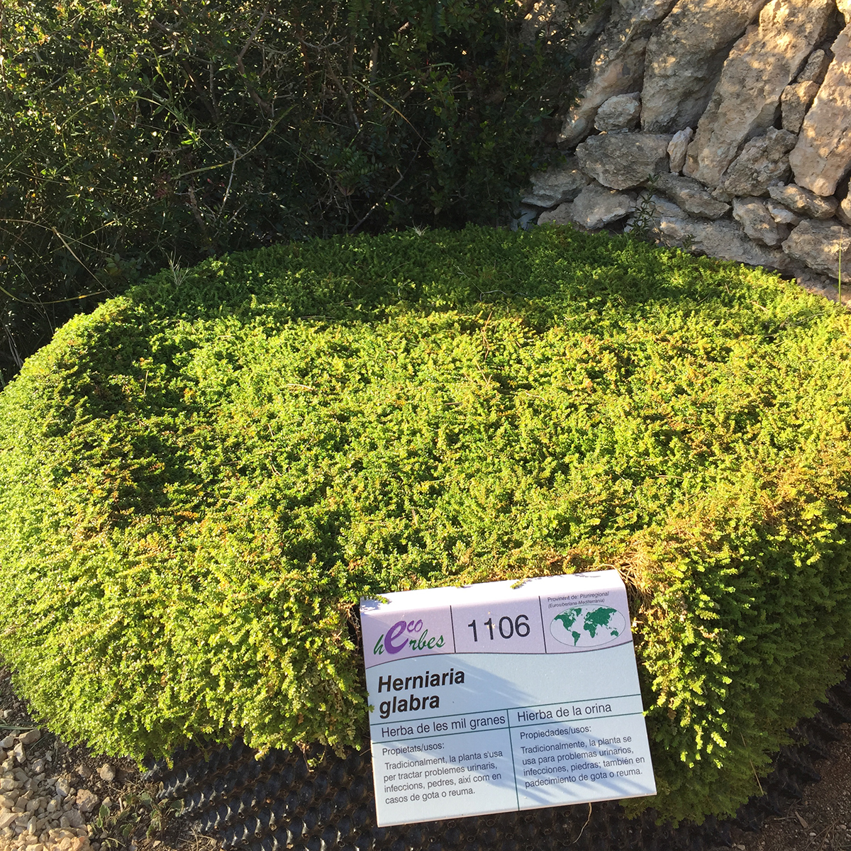 Herniaria glabra o Hierba de la orina en el Jardin Botanico de Plantas Medicinales Ecoherbes Park